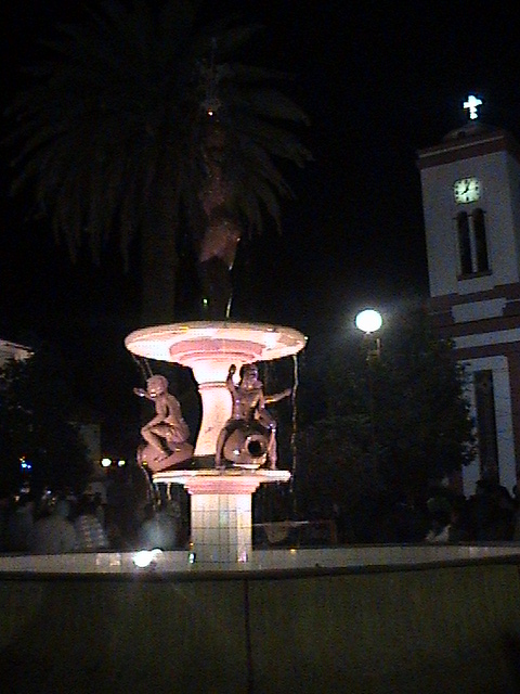 Fuente de La Plaza 18 de Mayo